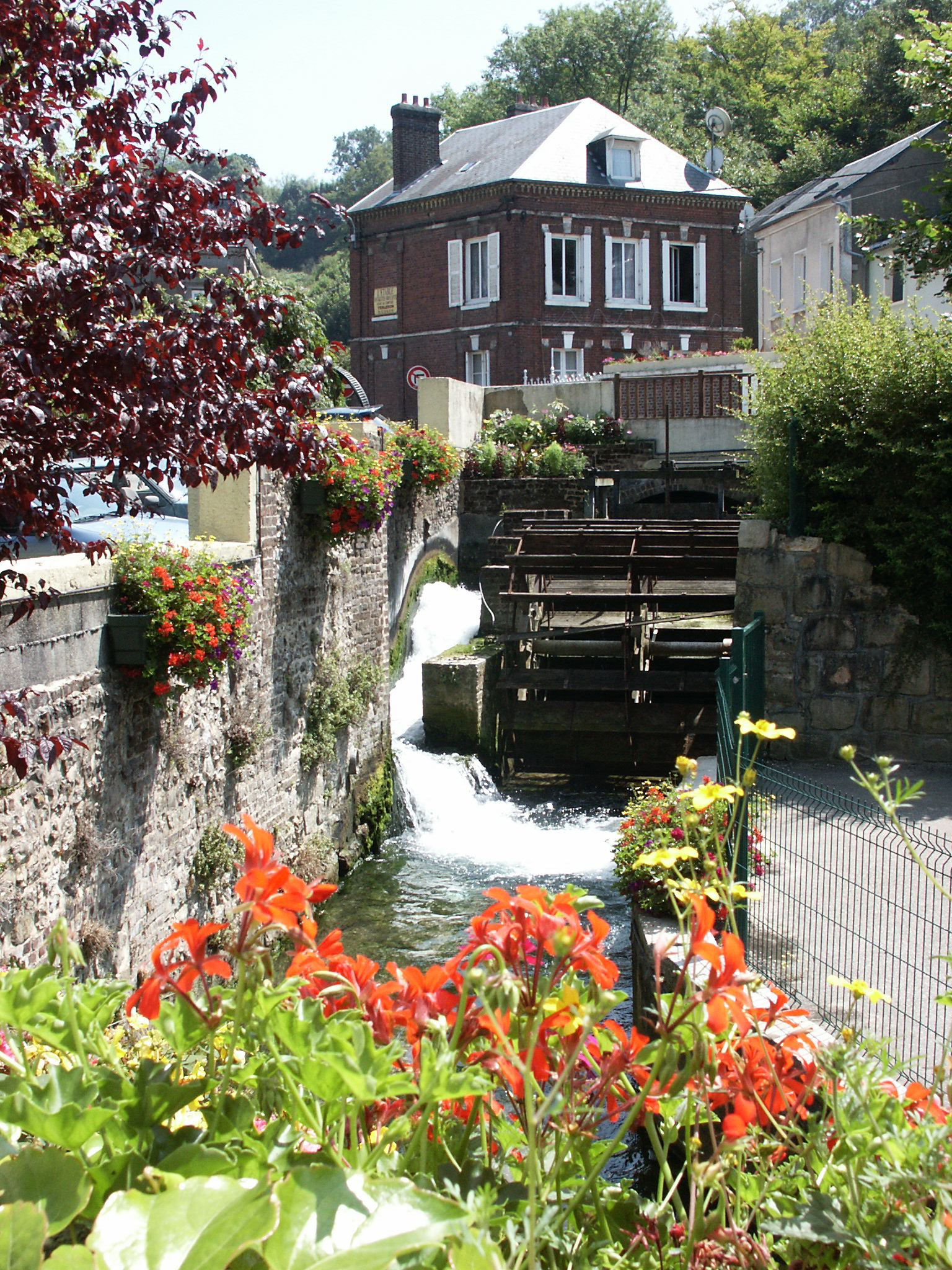 Roue moulin à eau